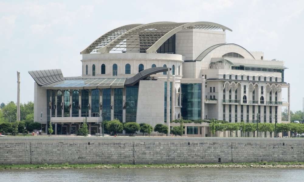 Nemzeti-Szinhaz-P5120700.jpg